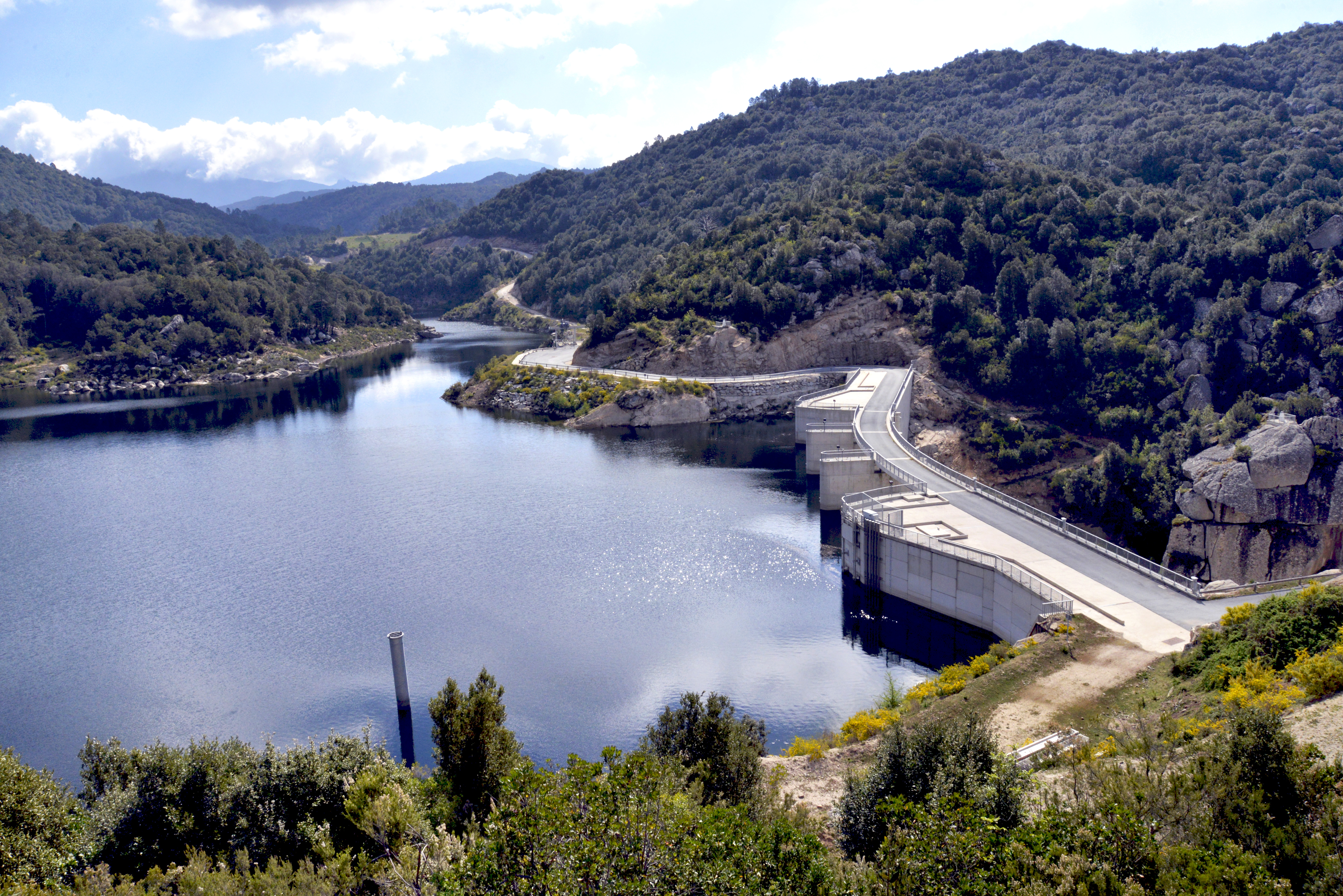 Levie, Alta Rocca (Corse-du-Sud) - Barrage du Rizzanese, « à cheval » sur Levie et Sorbollano. Sa première mise en eau est effectuée le 23 mai 2013.